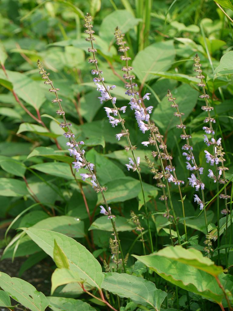 Salvia japonica：アキノタムラソウ 2010/07/31 和歌山県田辺市：Tanabe City. Wakayama pref. Japan